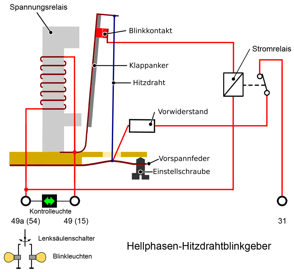 Hellphasen-Hitzdrahtblinkgeber, geänderte Zeichnung nach Biezl.